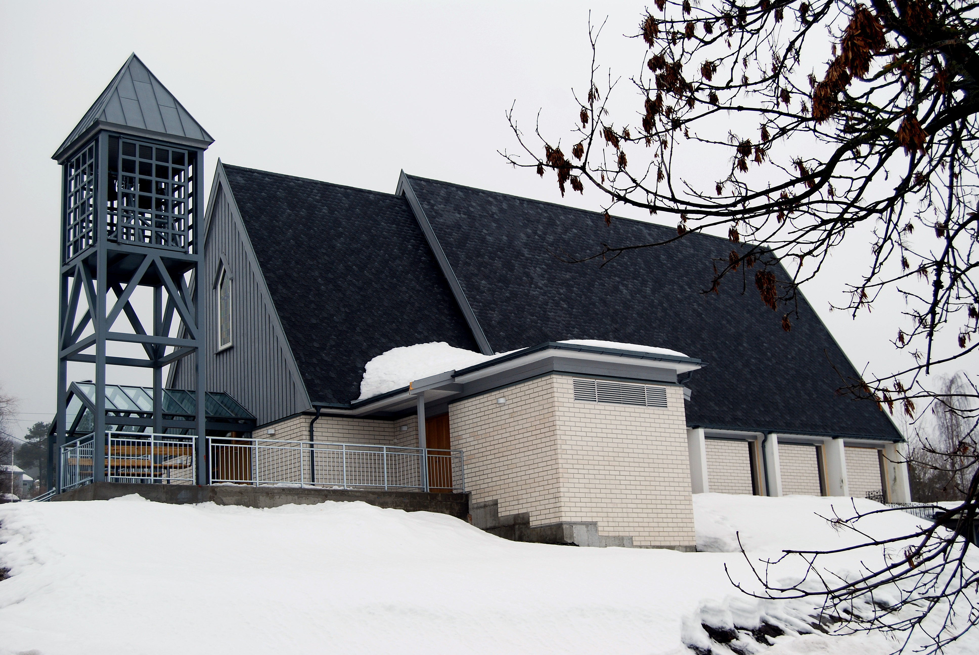 Stathelle kirke sett fra øst.